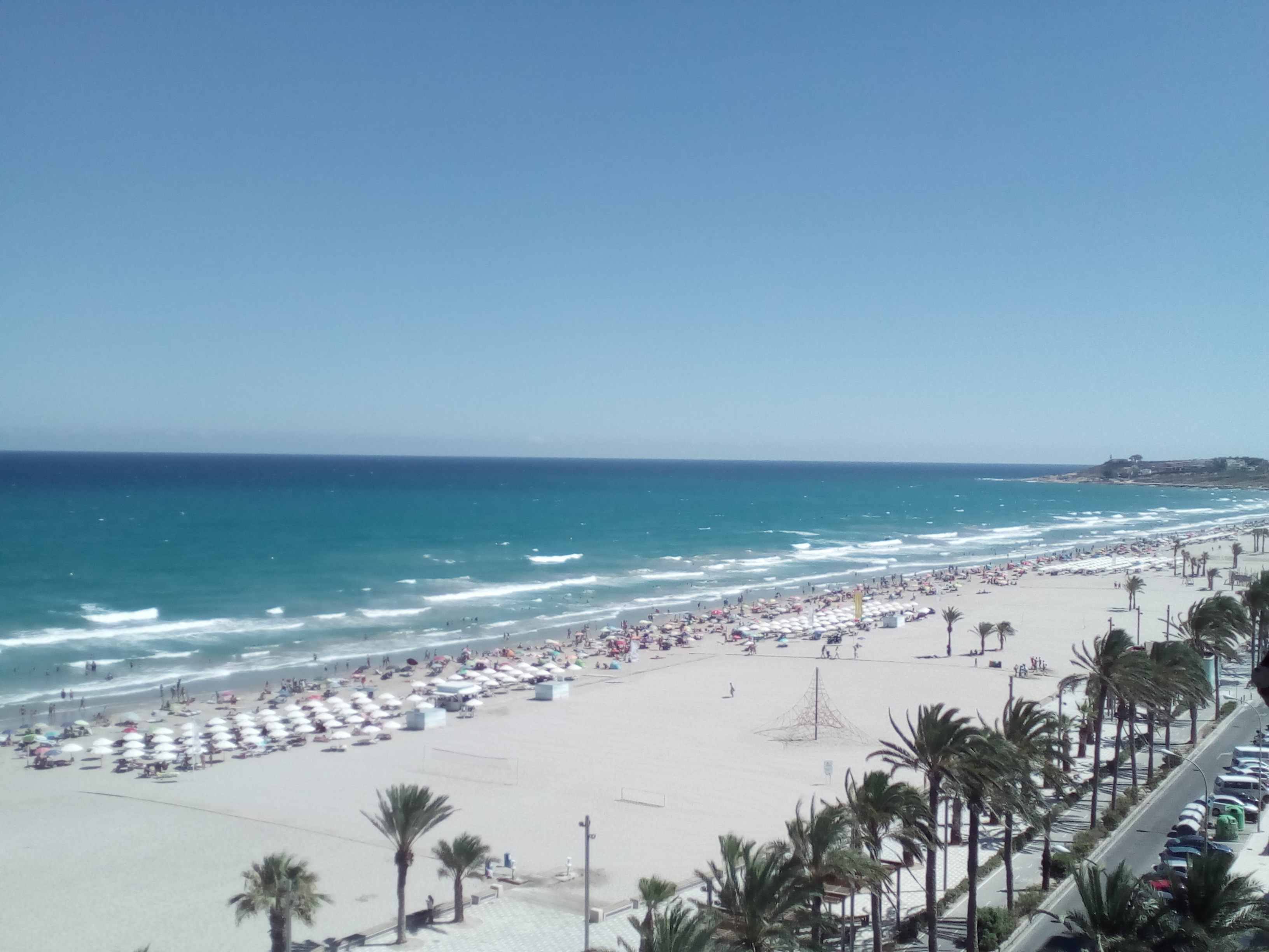 Vista de la playa de San Juan de Alicante, España.